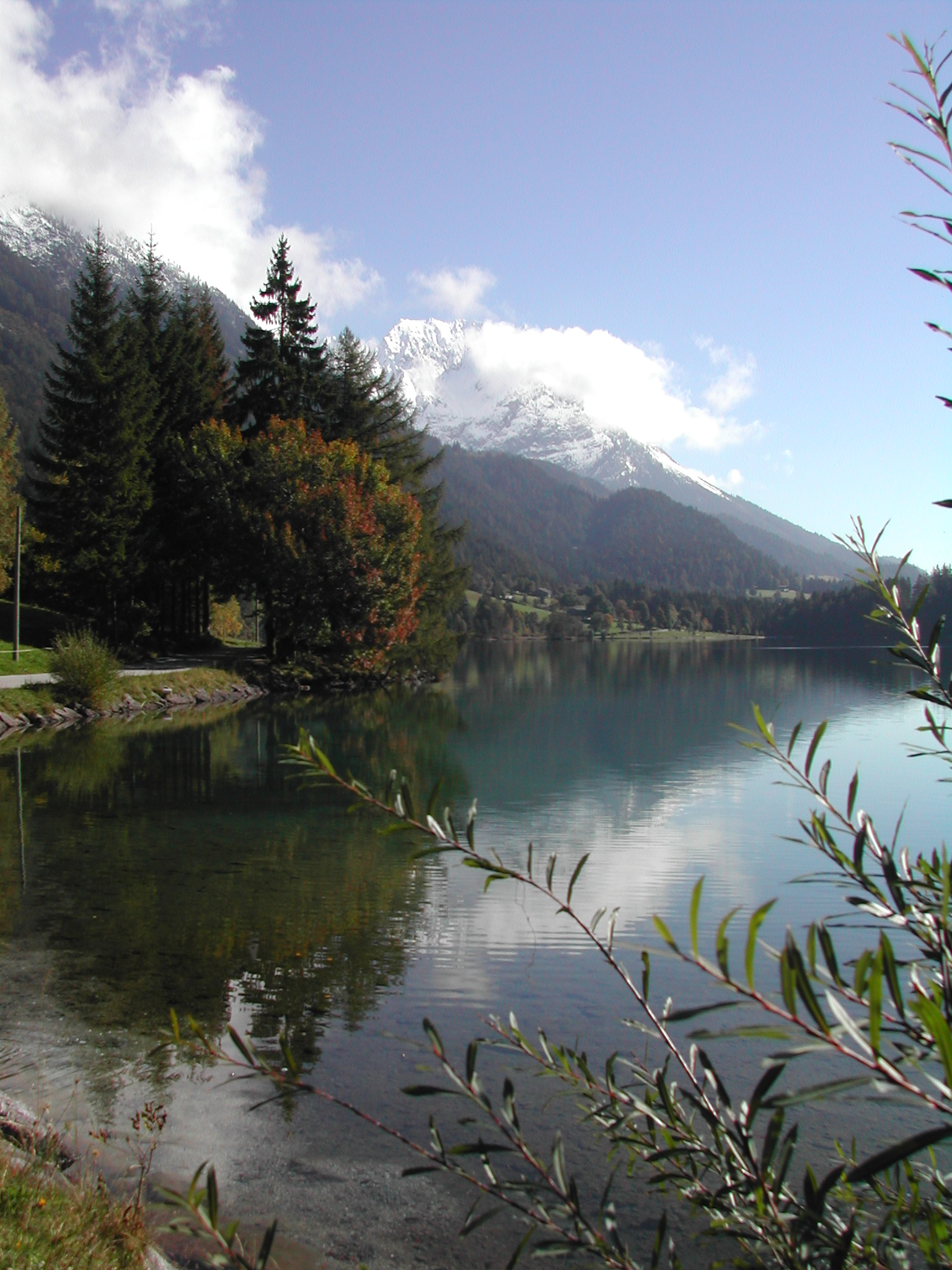 Hintersteiner See - Scheffau am Wilden Kaiser.